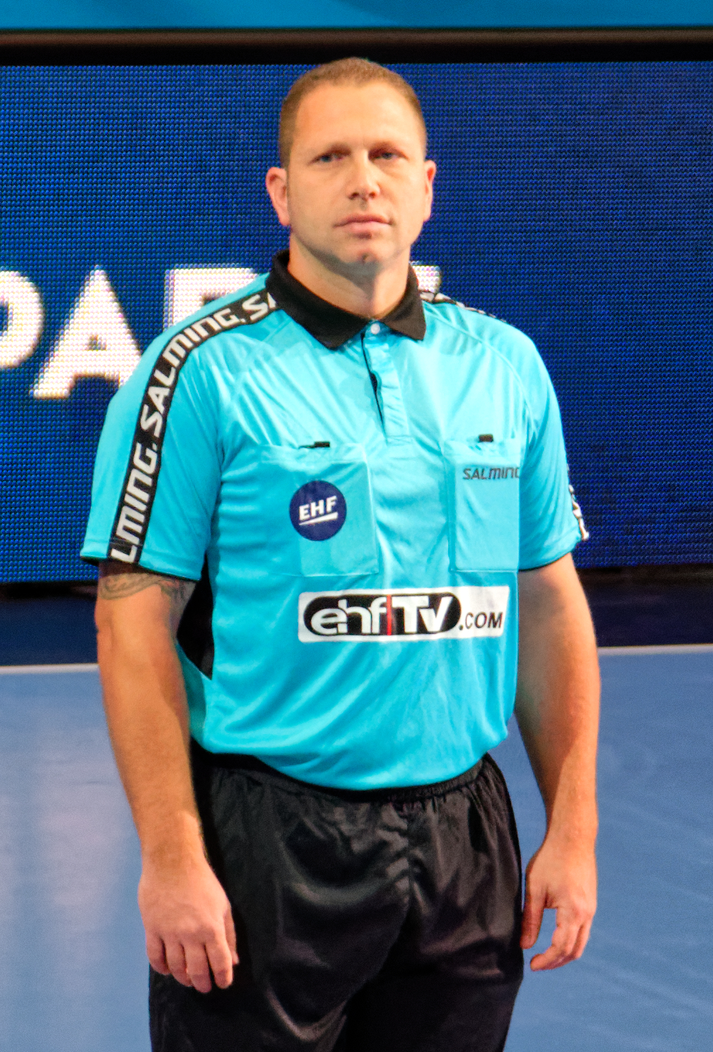 Rencontre de phase de groupe de la Ligue des champions 2016-17. A Coubertin, le 2 octobre 2016.